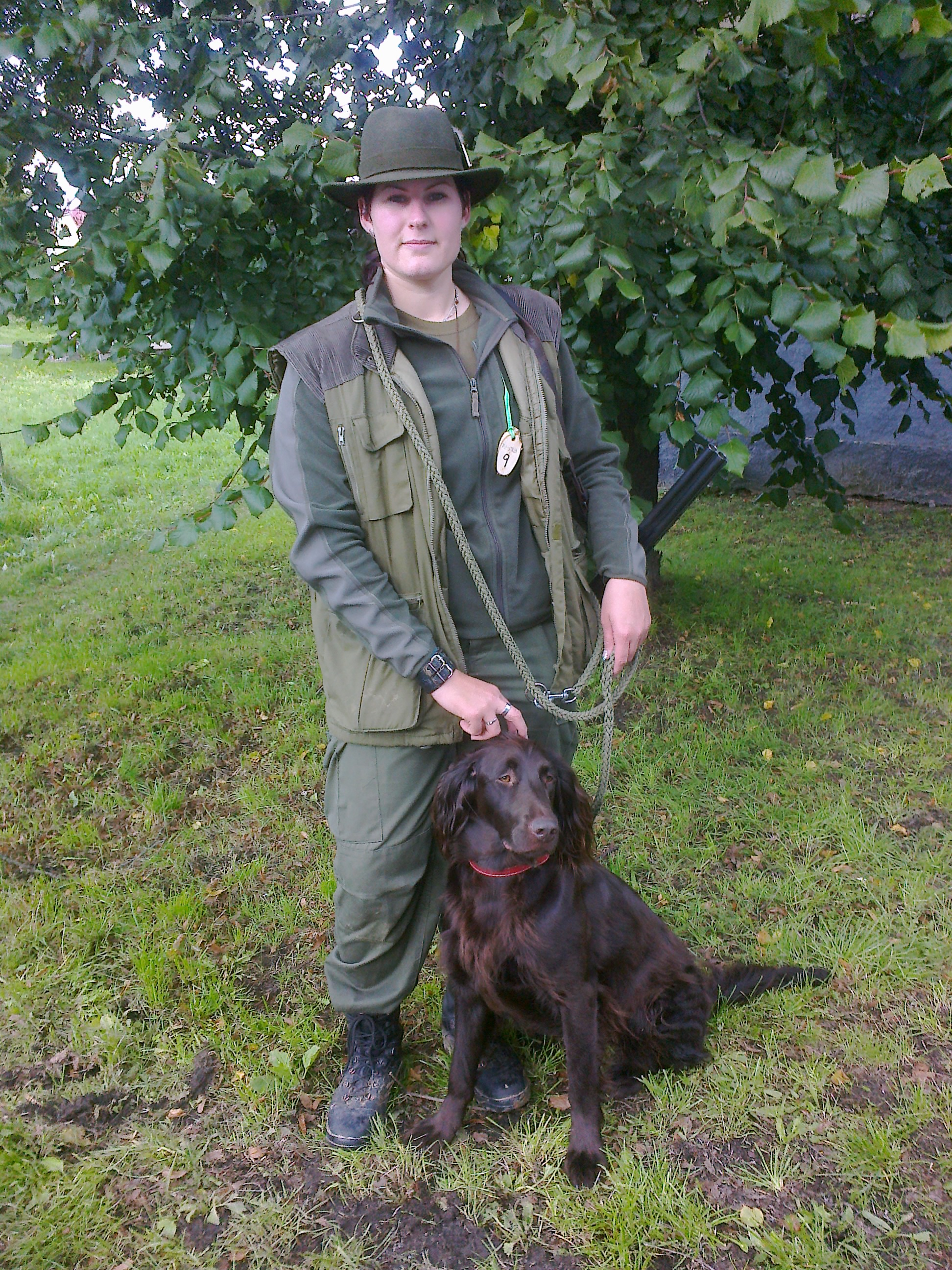 PZ